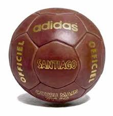 balon mundial 1962